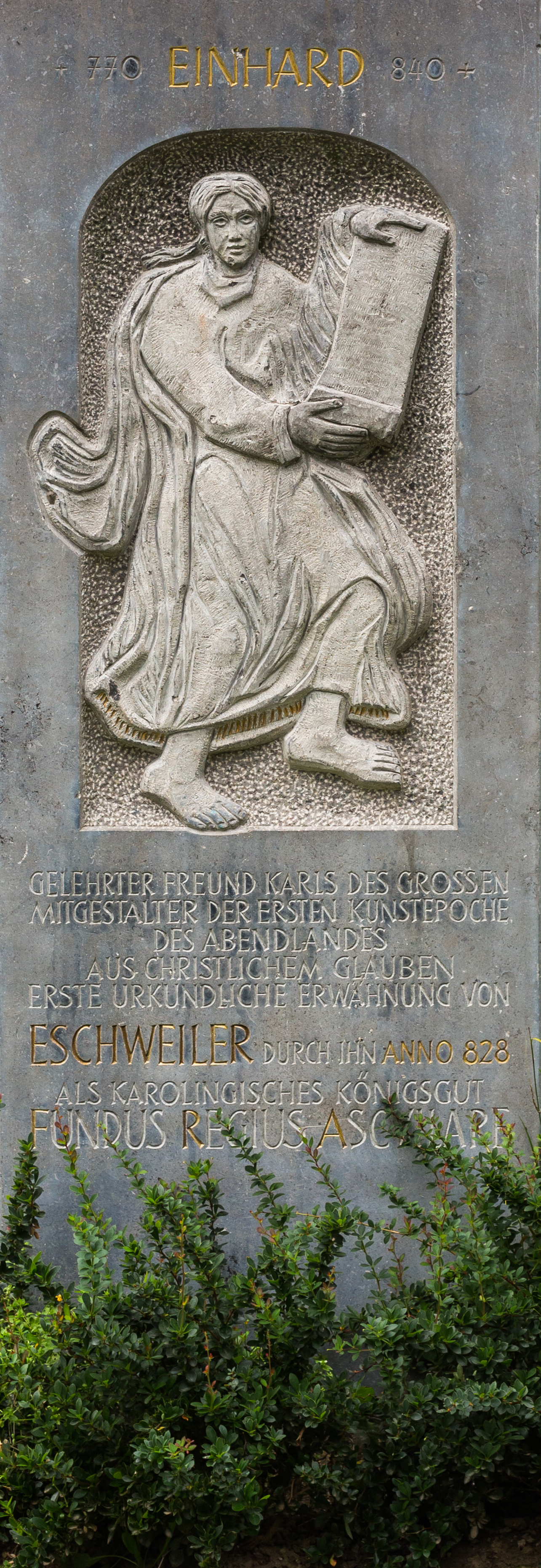 Denkmal zu Ehren des gelehrten Einhard (770-840). Dieser erwähnte die heutige Stadt Eschweiler zum ersten Mal im Jahre 828 als karolingisches Königsgut. Inschrift des Denkmals: + 770 EINHARD 840 + GELEHRTER FREUND KARLS DES GROSSEN MITGESTALTER DER ERSTEN KUNSTEPOCHE DES ABENDLANDES AUS CHRISTLICHEM GLAUBEN ERSTE URKUNDLICHE ERWÄHNUNG VON ESCHWEILER DURCH IHN ANNO 828 ALS KAROLINGISCHES KÖNIGSGUT FUNDUS REGIUS ASCVILARE